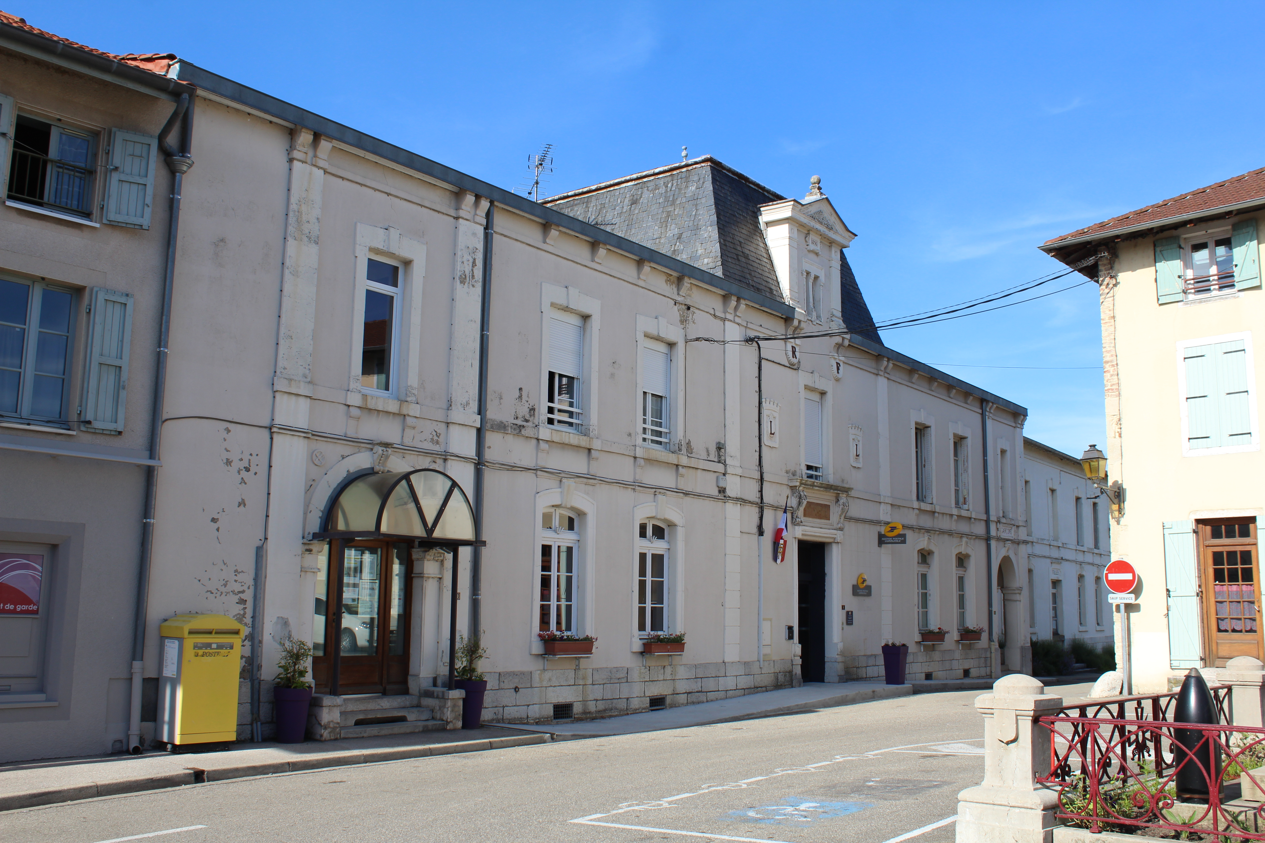 Mairie de Lent, Ain.